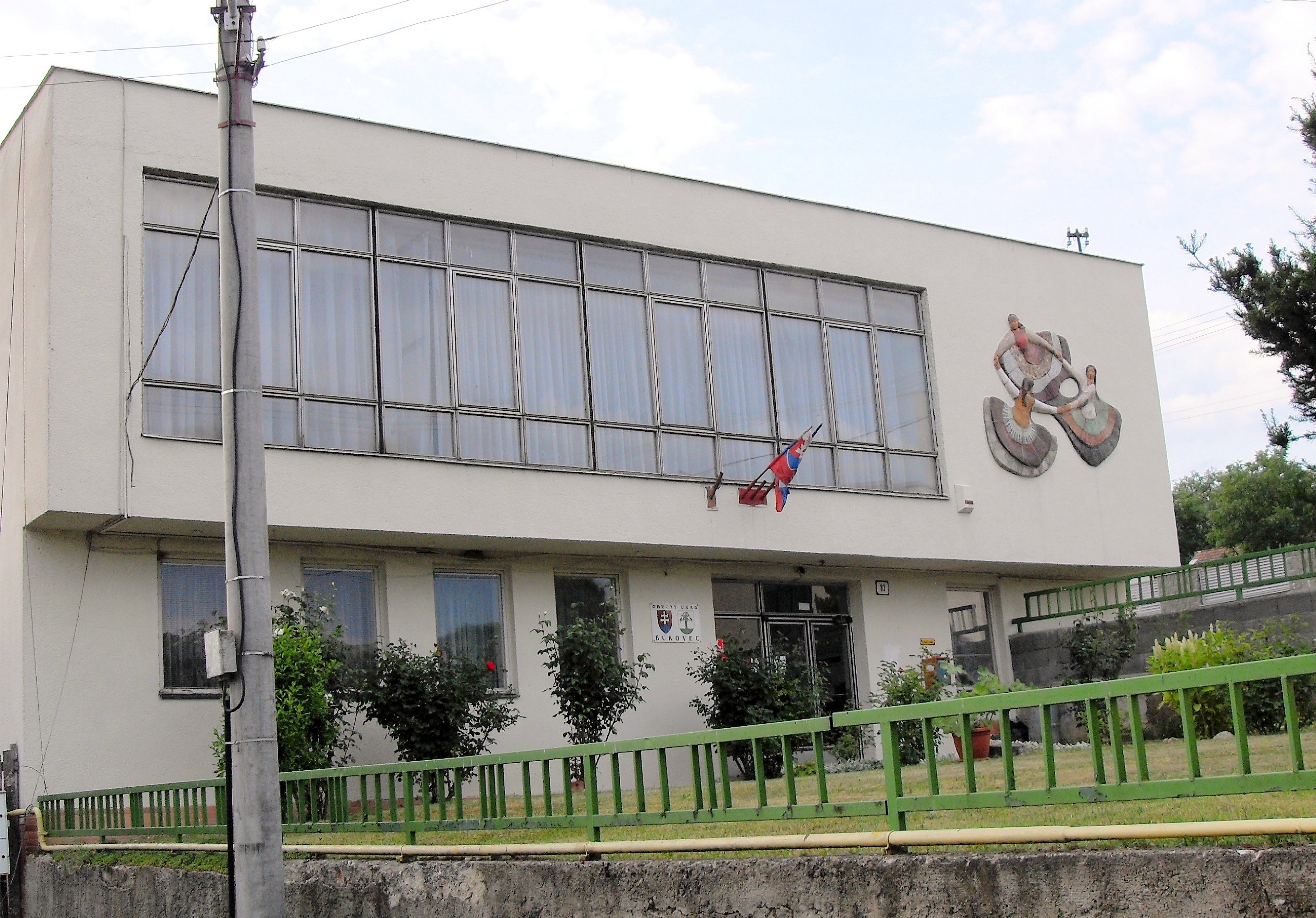 Obecný úrad v Bukovci